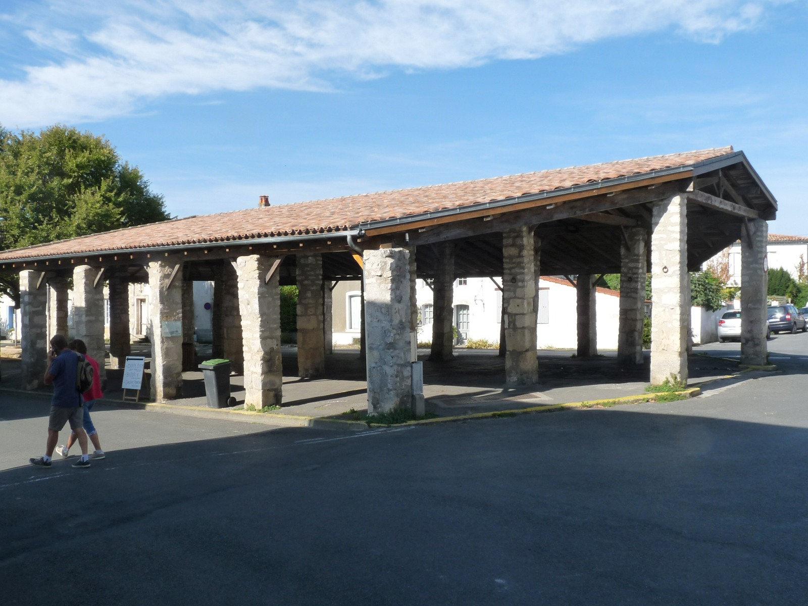 Halles de Mornac-sur-Seudre, Charente-Maritime, France